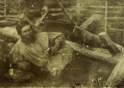 На фото изображён один из первых в мире электросварщиков рабочий Пермских пушечных заводов Лука Иванович Борчанинов. Снимок сделан неизвестным автором в 1904 году